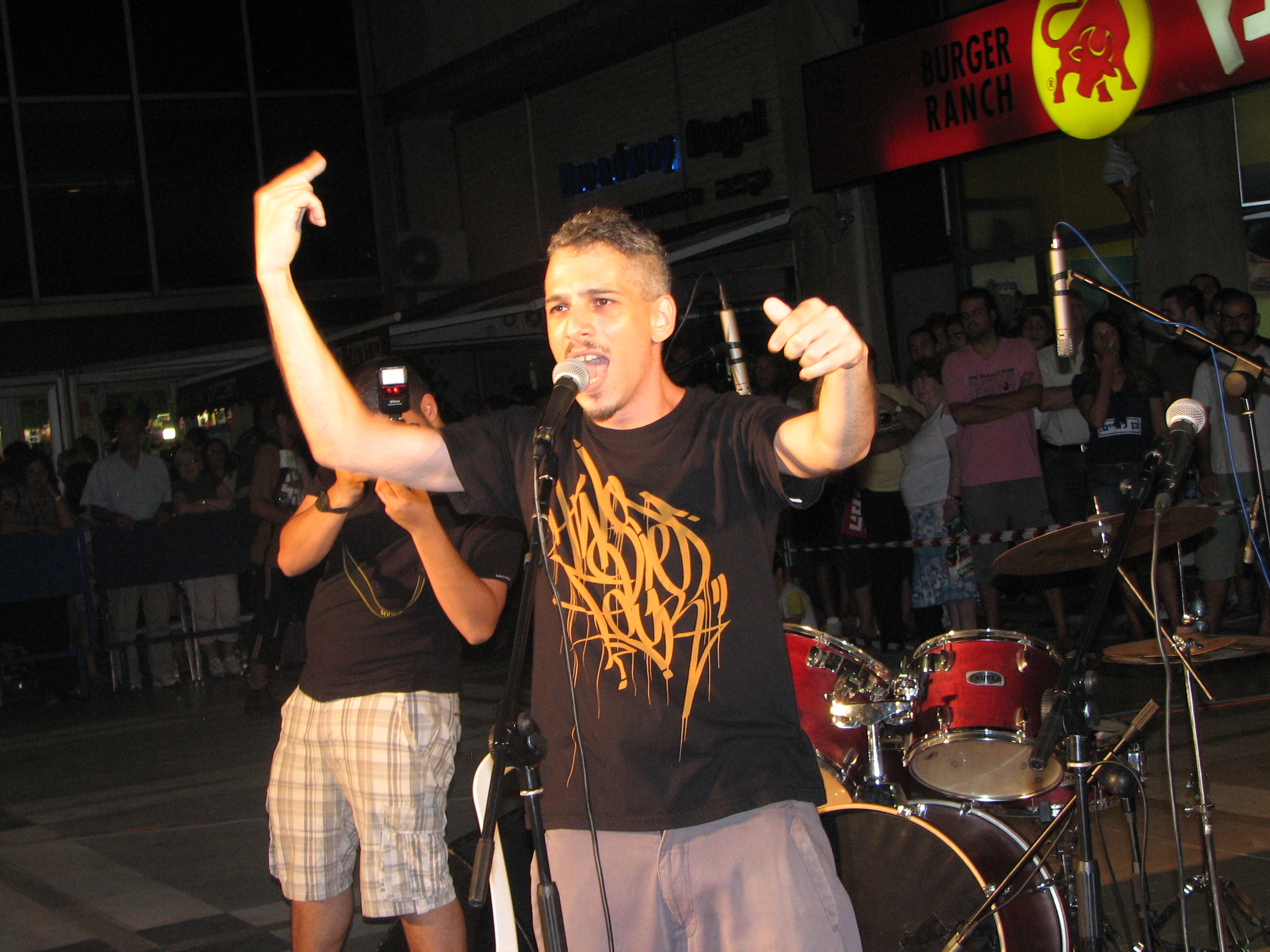 The 2011 housing protests in Israel, are a series of ongoing street demonstrations taking place throughout Israel from 14 July 2011 onwards. Protests in Haifa On the evening of the July 30, 2011, 11,000 demonstrators participated in a protest rally held in the center of Haifa. The demonstration included a mass march, which began at around 20:30, at the Isac park to the Horev Square, where the main rally was held. מחאת הדיור היא הכינוי לסדרת הפגנות המתקיימות ברחבי ישראל מה-14 ביולי 2011 ואילך. במוצאי שבת התקיימו הפגנות שונות ברחבי ישראל כאשר לפחות 150 אלף בני אדם יצאו לרחובות כדי להפגין נגד המדיניות החברתית של ממשלת נתניהו וקראו קריאות בגנות הממשלה ובעד צדק חברתי.הפגנות התקיימו בין היתר בחיפה, ירושלים, בבאר שבע, בכפר סבא ורעננה, בבאקה אל-גרבייה ובצומת סביון, באשדוד ונתניה, קרית שמונה, טבריה ועמק הירדן. ההפגנה בחיפה, החלה בכינוס בגן יצחק שבפינת רחובות מאפו ושדרות מוריה בשכונת אחוזה, בשעה 20:30 לערך, מכן התקיימה תהלוכה עד כיכר חורב שם הוקמה במה נישאו נאומים שונים ומופעים. הקריאה המרכזית בהפגנה הייתה "העם דורש צדק חברתי". ההפגנה התפזרה בשעה 22:45 לערך. על פי הערכת משטרת חיפה, בהפגנה השתתפו כ-11,000 איש הראפר קוואמי דה לה פוקס נשא דברים בהפגנה, והגיש שני שירים שכתב, אחד מהם חדש לחלוטין שכתב לכבוד ההפגנה בחיפה. התייחס לכךף שההפגנה בחיפה מעידה שהמחאה אינה תל אביבית אלא ארצית